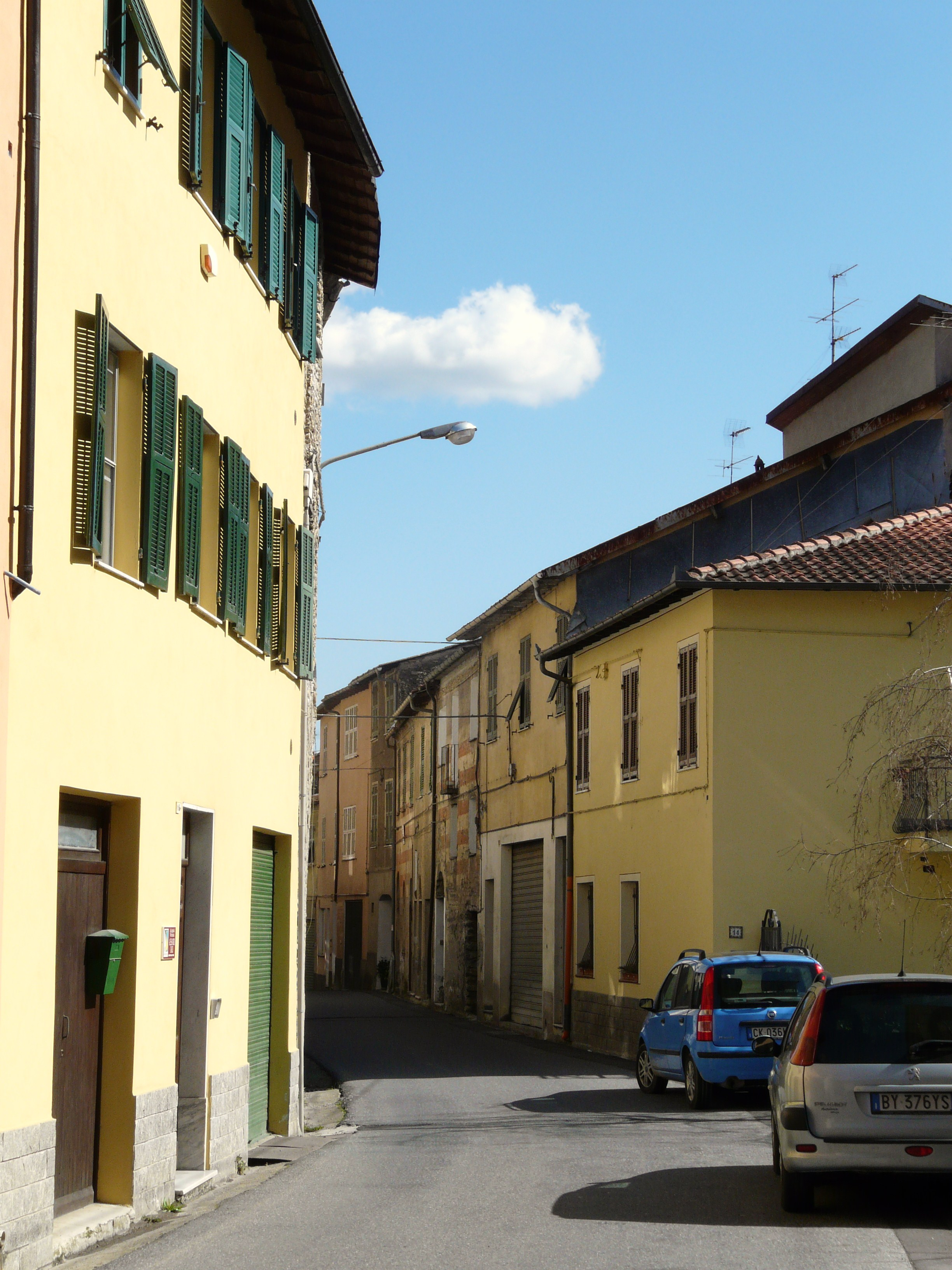 Ranzo, Liguria, Italia